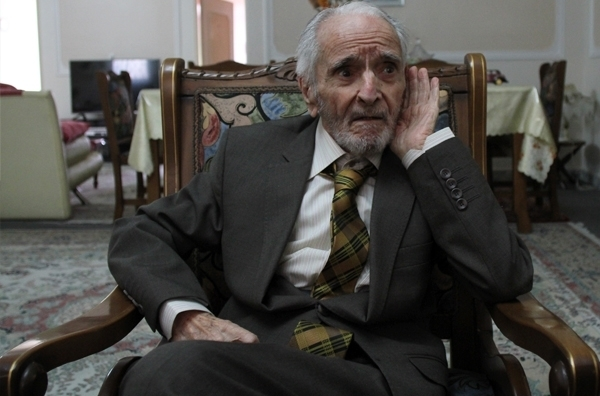 انور خامه ای در گفتگو با خبرگزاری فارس